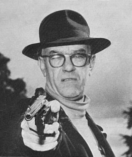 Torsten Ullman